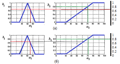 «скорость автомобиля средняя» И «температура кофе высокая» (а) «скорость автомобиля средняя» ИЛИ «температура кофе высокая» (б)